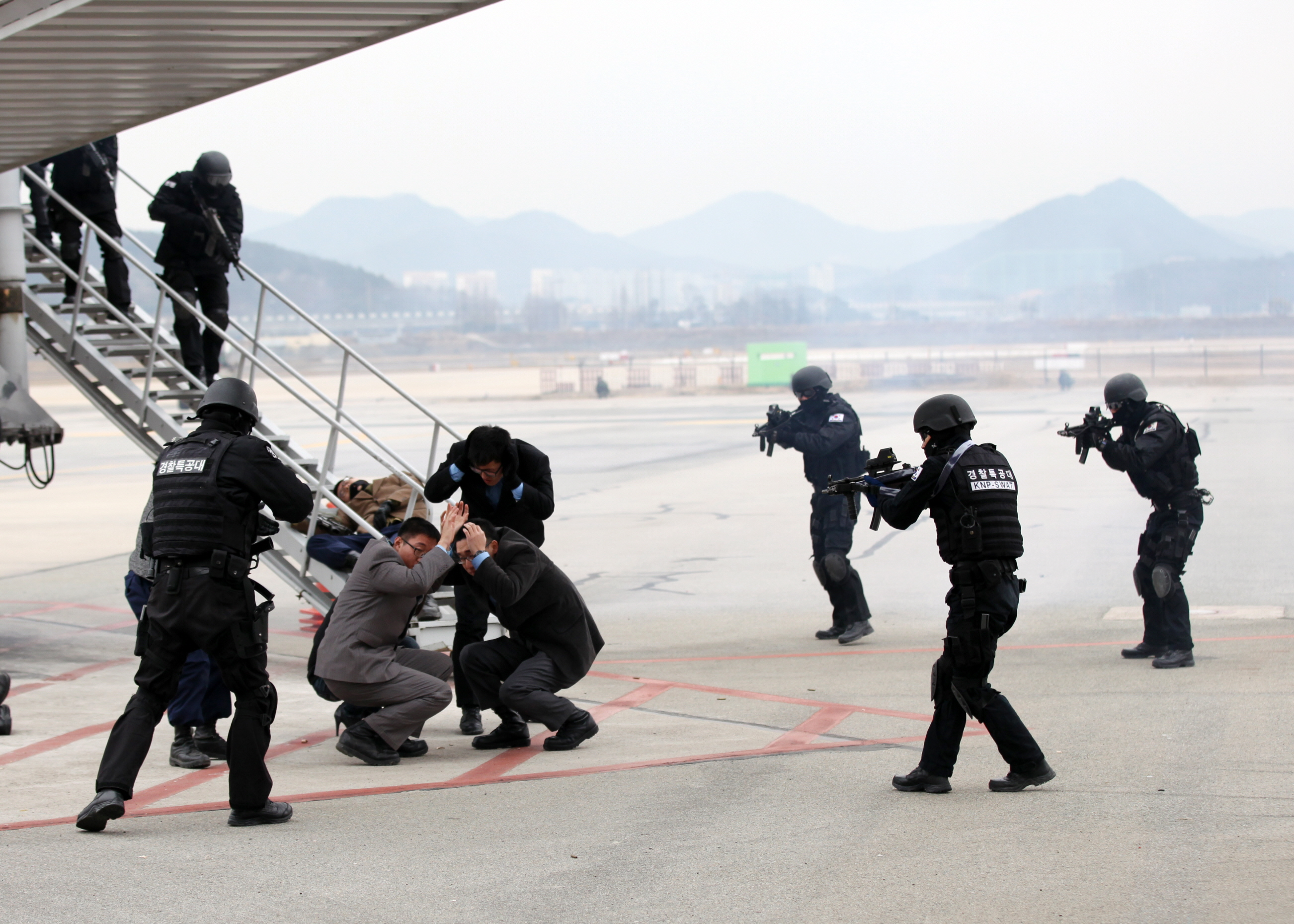 2012년 2월 공군 1전비 공항 대테러 훈련(14)